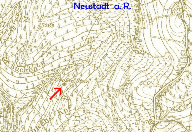 Der südliche Stadtrand von Neustadt am Rennsteig mit dem Gr. Stein.